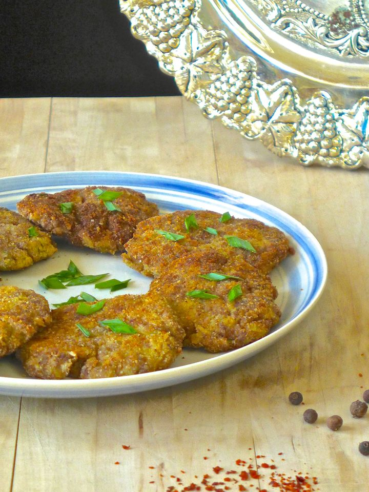 Ejjeh